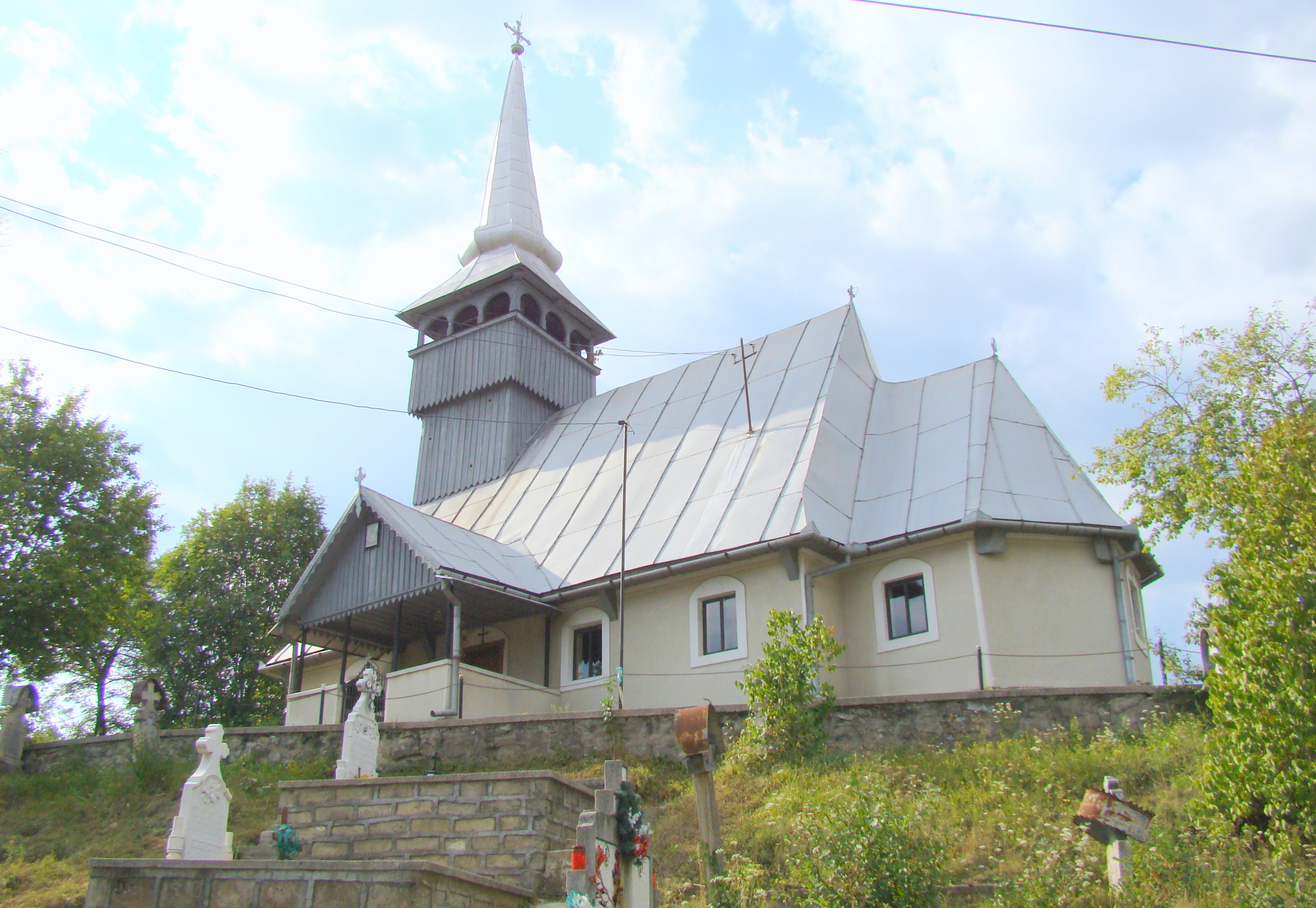 Biserica de lemn din Zdrapti-Hunedoara